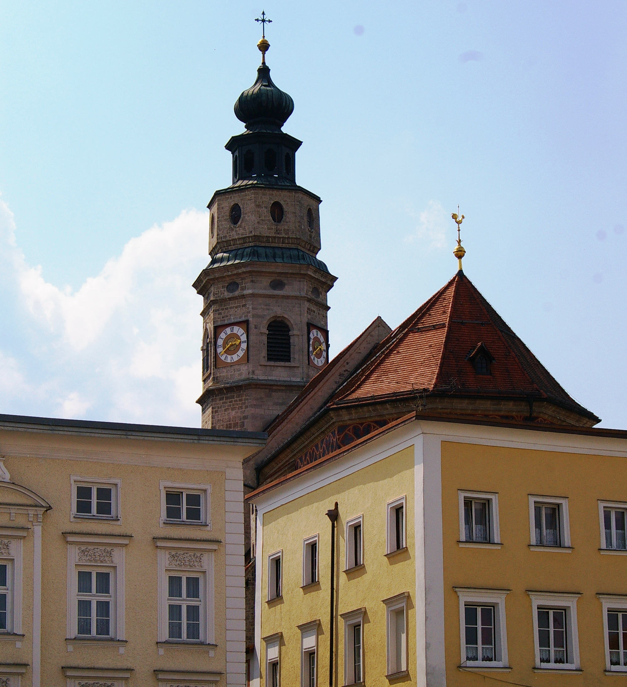 St.Laurentius vom Stadtplatz aus gesehen